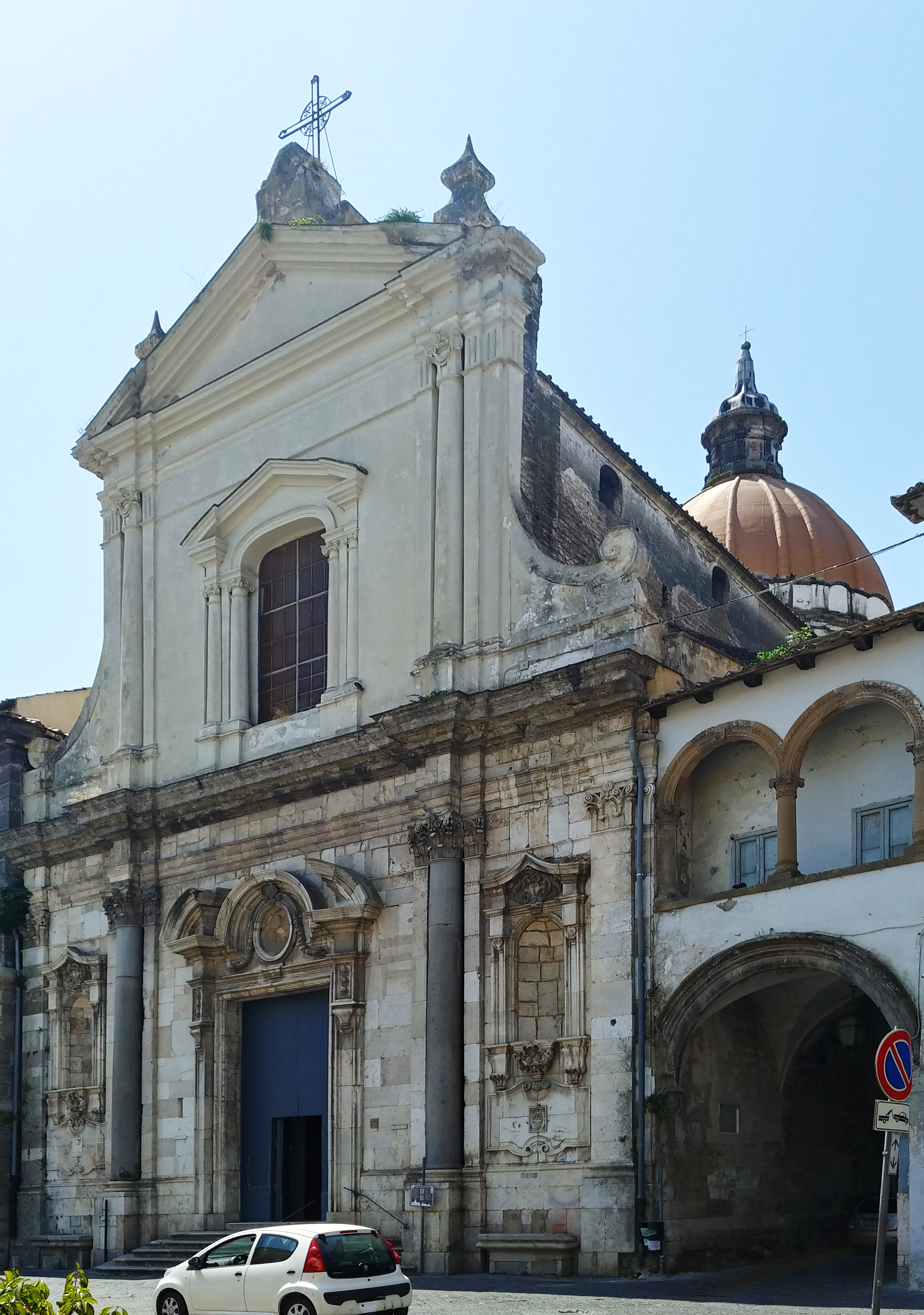 Esterno.